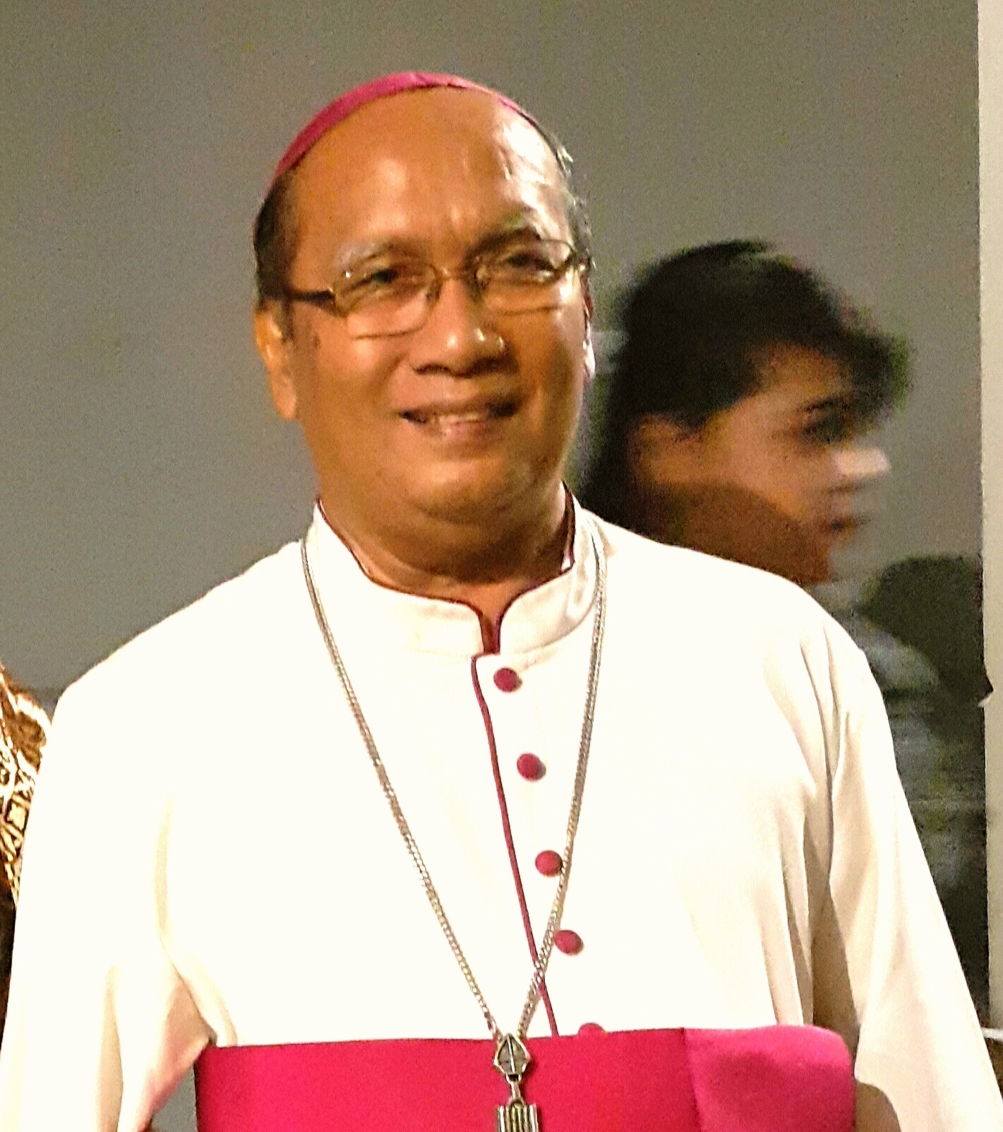 Mgr John Liku Ada, Uskup Agung Makassar